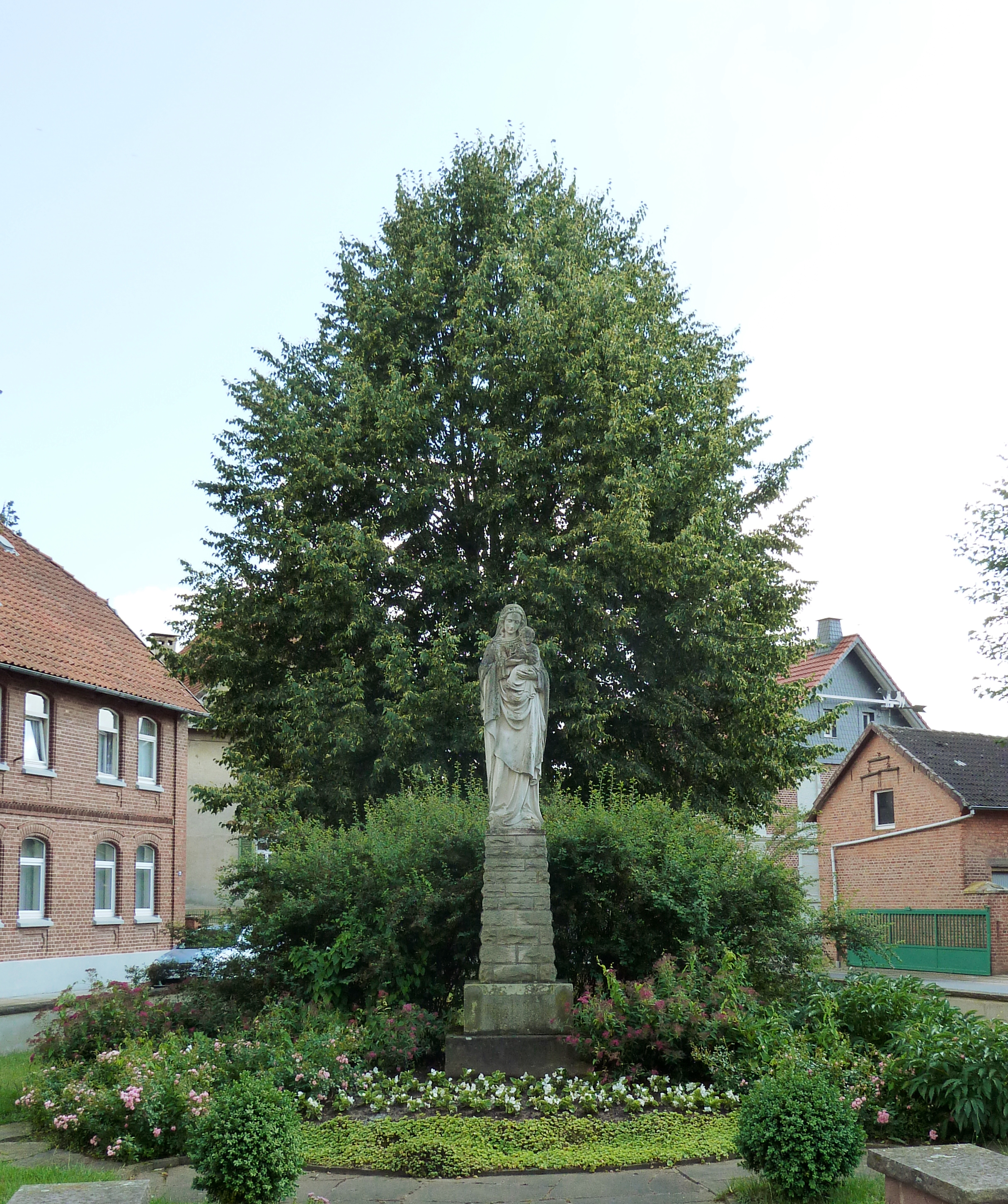 Mariensäule am Marienplatz in Lindau im Eichsfeld, Gemeinde Katlenburg-Lindau, Landkreis Northeim, Südniedersachsen. Errichtet zur Erinnerung an einen Brand im Jahr 1911